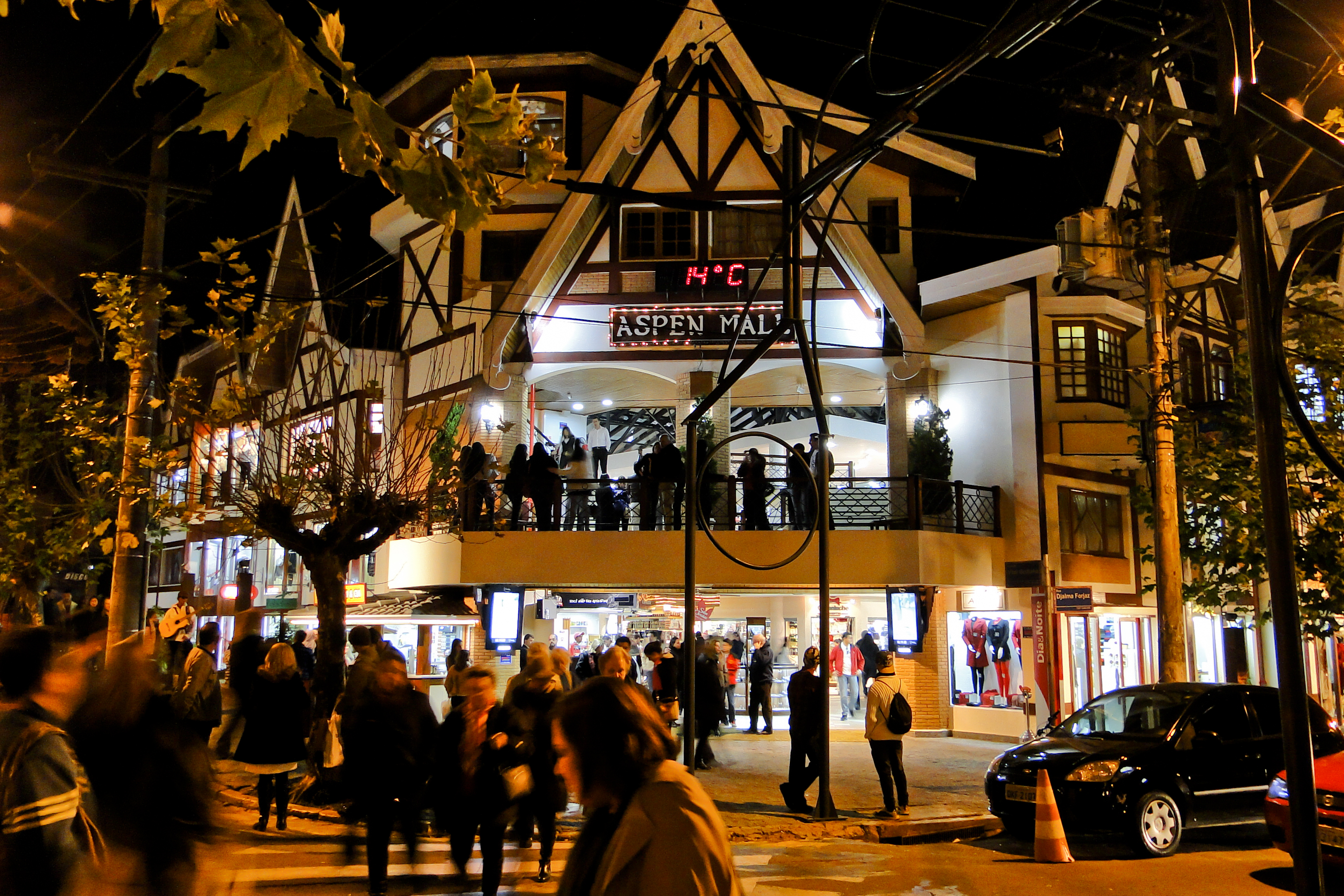 Português Campos do Jordão é um município brasileiro localizado no interior do estado de São Paulo, mais precisamente na Serra da Mantiqueira; faz parte da recém-criada Região Metropolitana do Vale do Paraíba e Litoral Norte, sub-região 2 de Taubaté. A cidade fica à altitude de 1 628 metros, sendo portanto, o mais alto município brasileiro, considerando a altitude da sede.Distância de 173 km da cidade de São Paulo , 350 km do Rio de Janeiro e 500 km de Belo Horizonte. Sua principal via de acesso é a Rodovia Floriano Rodrigues Pinheiro. Campos do Jordão é um dos quinze municípios paulistas considerados estâncias climáticas pelo estado, por cumprirem os pré-requisitos definidos por lei estadual. Tal nomeação garante a esses municípios uma verba maior por parte do Estado para a promoção do turismo regional. O município também adquire o direito de agregar junto a seu nome o título de estância climática, termo pelo qual passa a ser designado tanto pelo expediente municipal oficial quanto pelas referências estaduais. Campos do Jordão é chamada de "Suíça Brasileira", como estratégia de marketing, pela sua arquitetura tardia baseada em construções europeias e pelo seu clima mais frio que a média brasileira. Por isso, a cidade recebe maior quantidade de turistas durante a estação do inverno, especialmente no mês de julho. É o município com a sede administrativa mais elevada do país, atingindo 1 628 metros acima do nível do mar, onde está localizada a prefeitura da cidade, e que pode variar para mais de 2 000 metros nos arredores do município. Está localizado no maciço da Serra da Mantiqueira, uma das mais elevadas cadeias de montanhas do Brasil. Possui uma área de 289,5 km². É constantemente visitado por turistas de todo o Brasil e até mesmo do exterior, que vão à localidade para gozar do clima de inverno. Fonte: Wikipedia Campos do Jordão (Brazilian